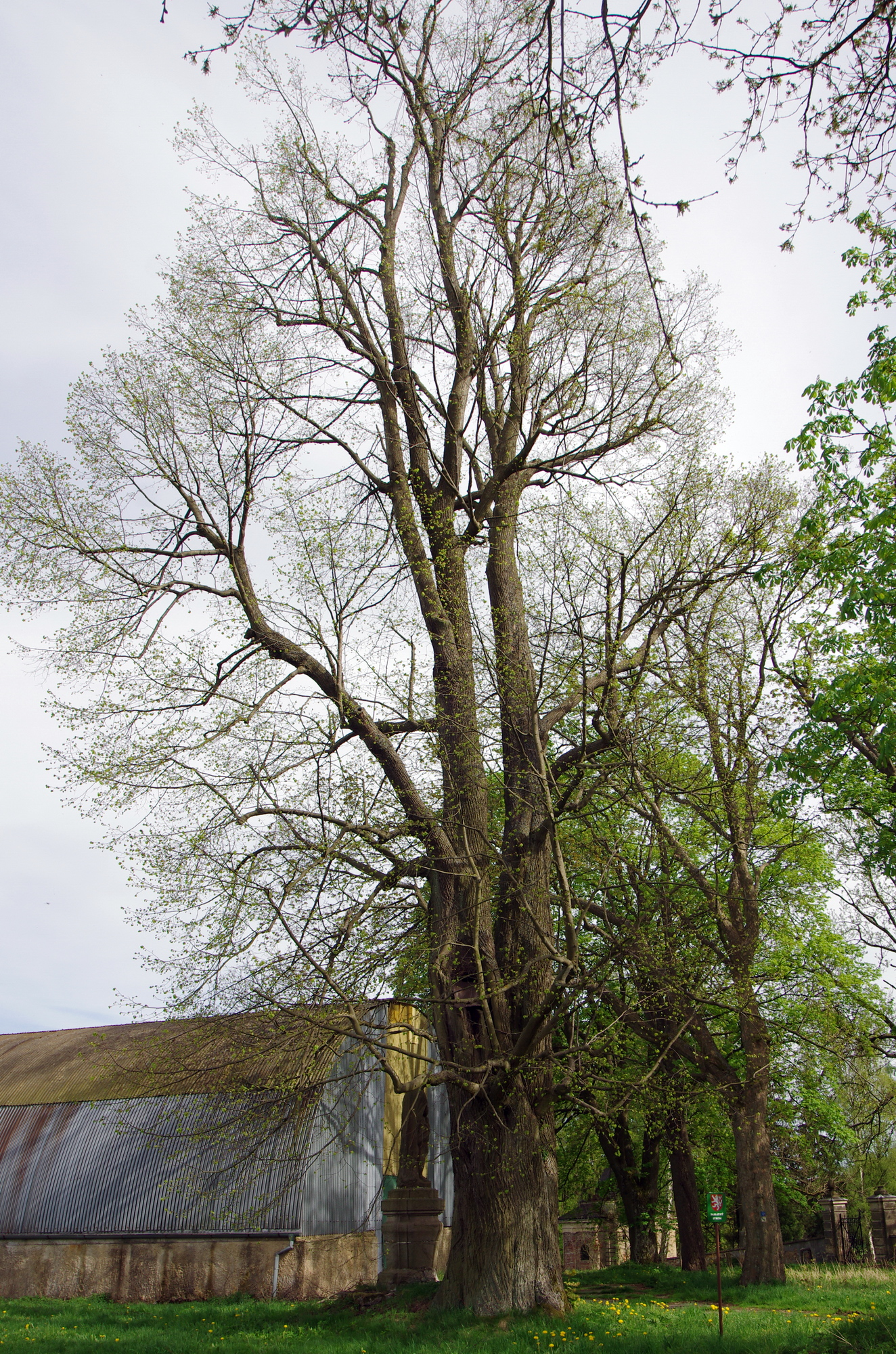 památný strom Lípa u hřbitova, Teplá, okres Cheb